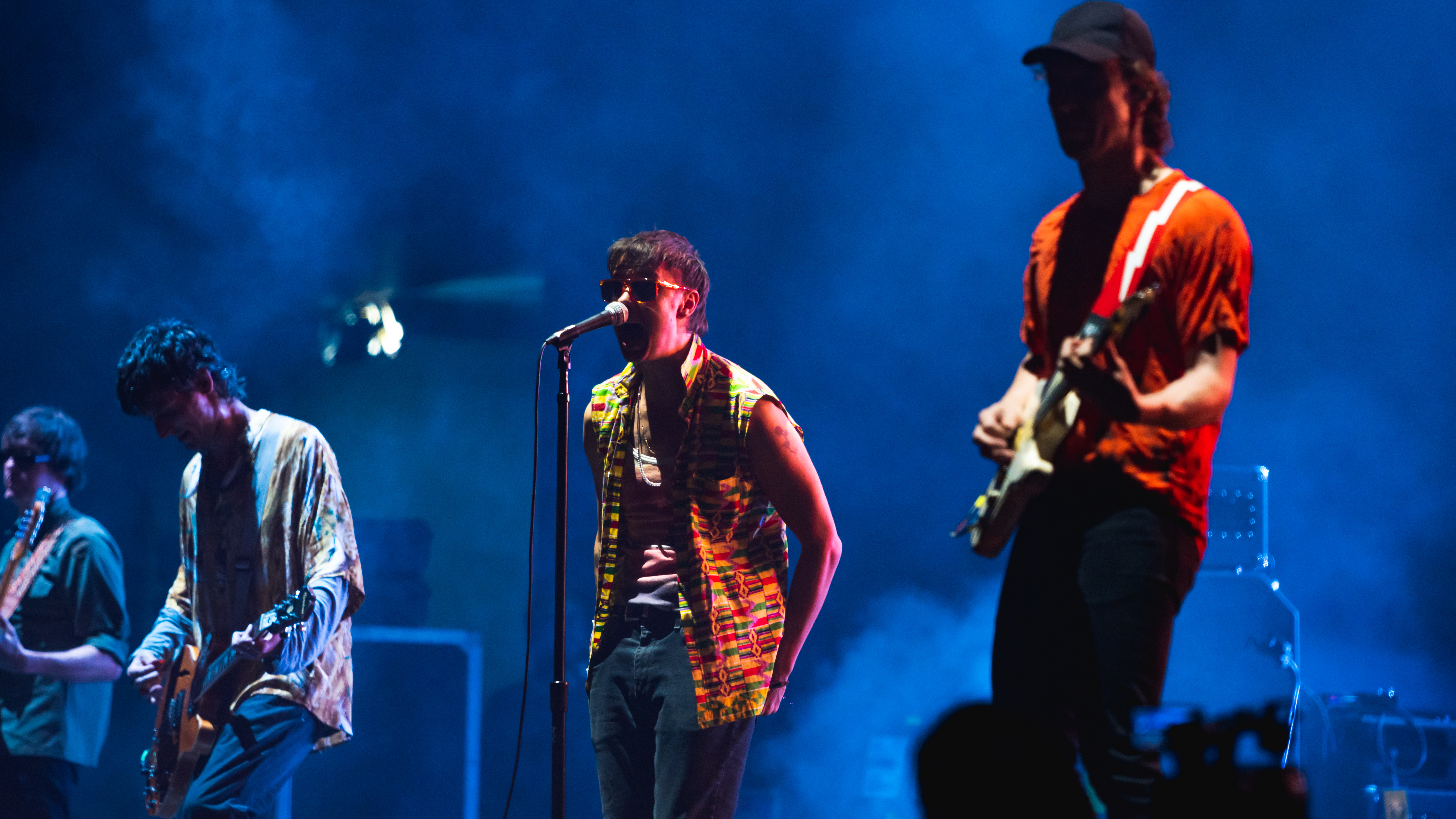 StrokesVivoLima231119-34